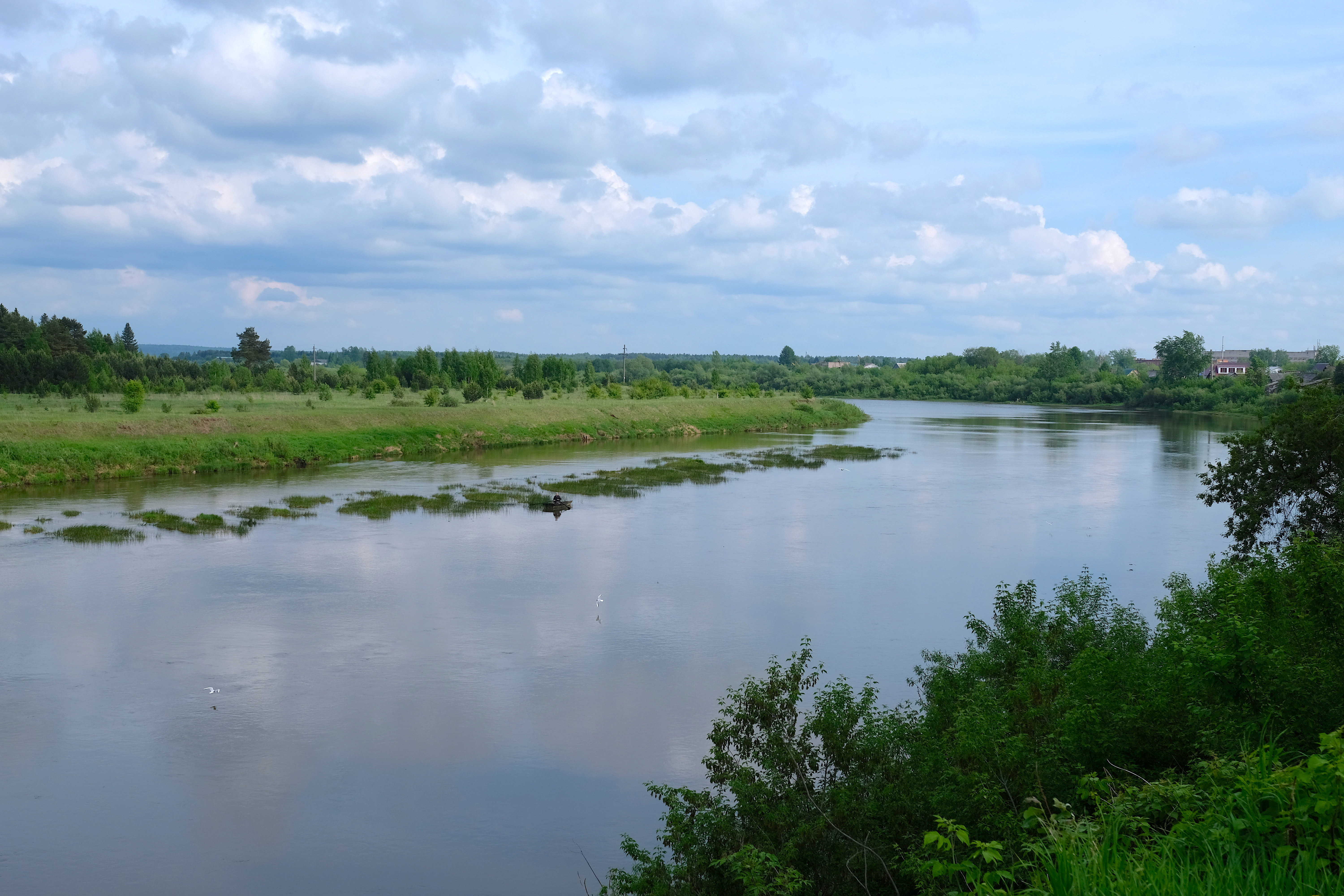 Река Чепца в посёлке Балезино в Удмутрии